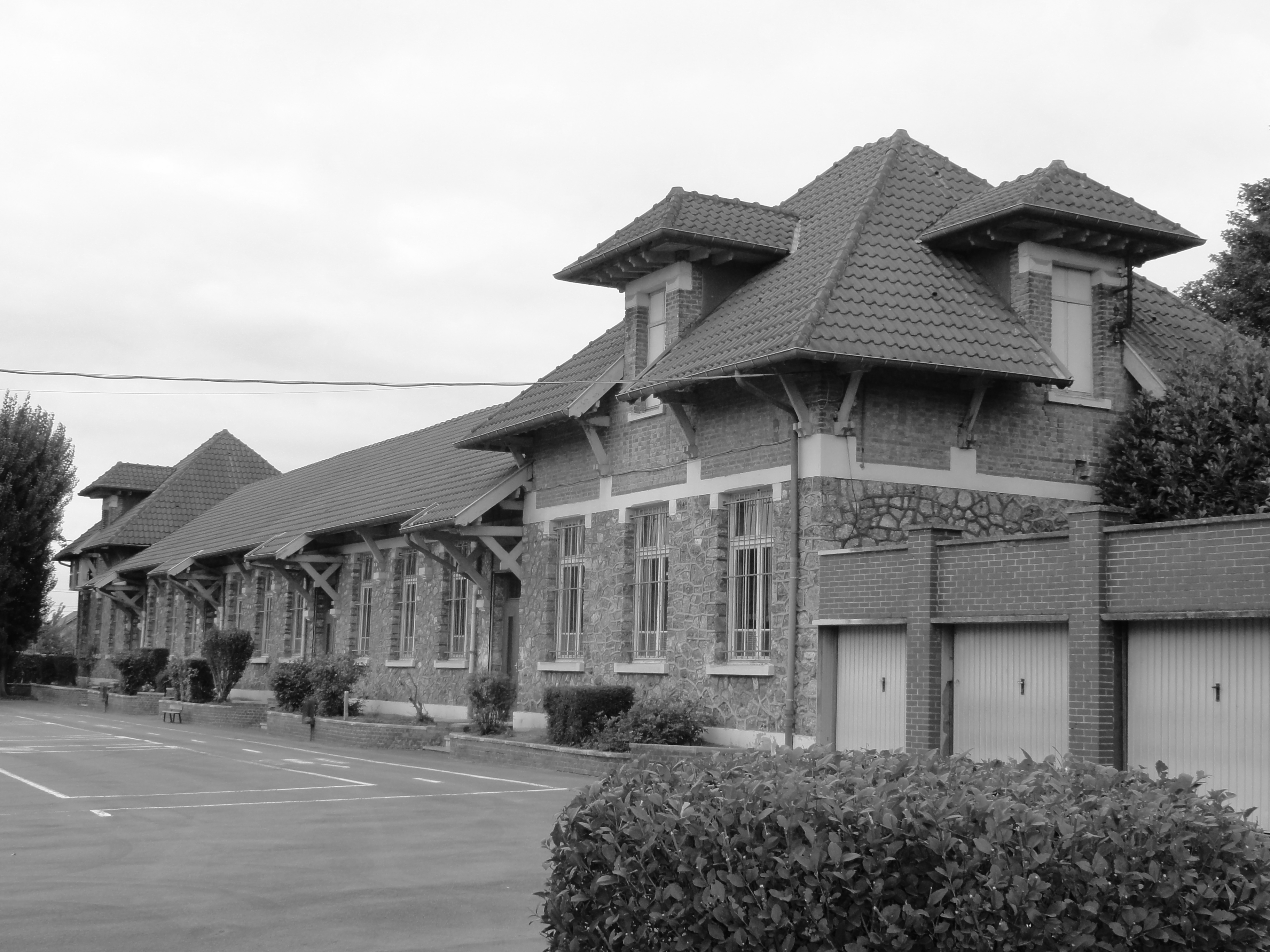 Écoles des cités de la Fosse n° 11 - 19 de la Compagnie des mines de Lens, Lens, Pas-de-Calais, Nord-Pas-de-Calais, France. .